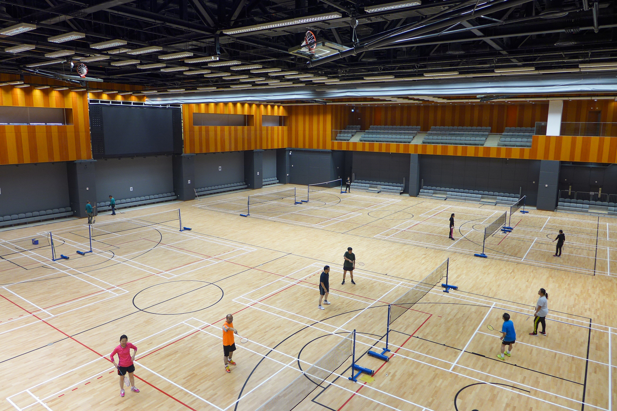 Yuen Chau Kok Sports Centre Multi Purpose Arena